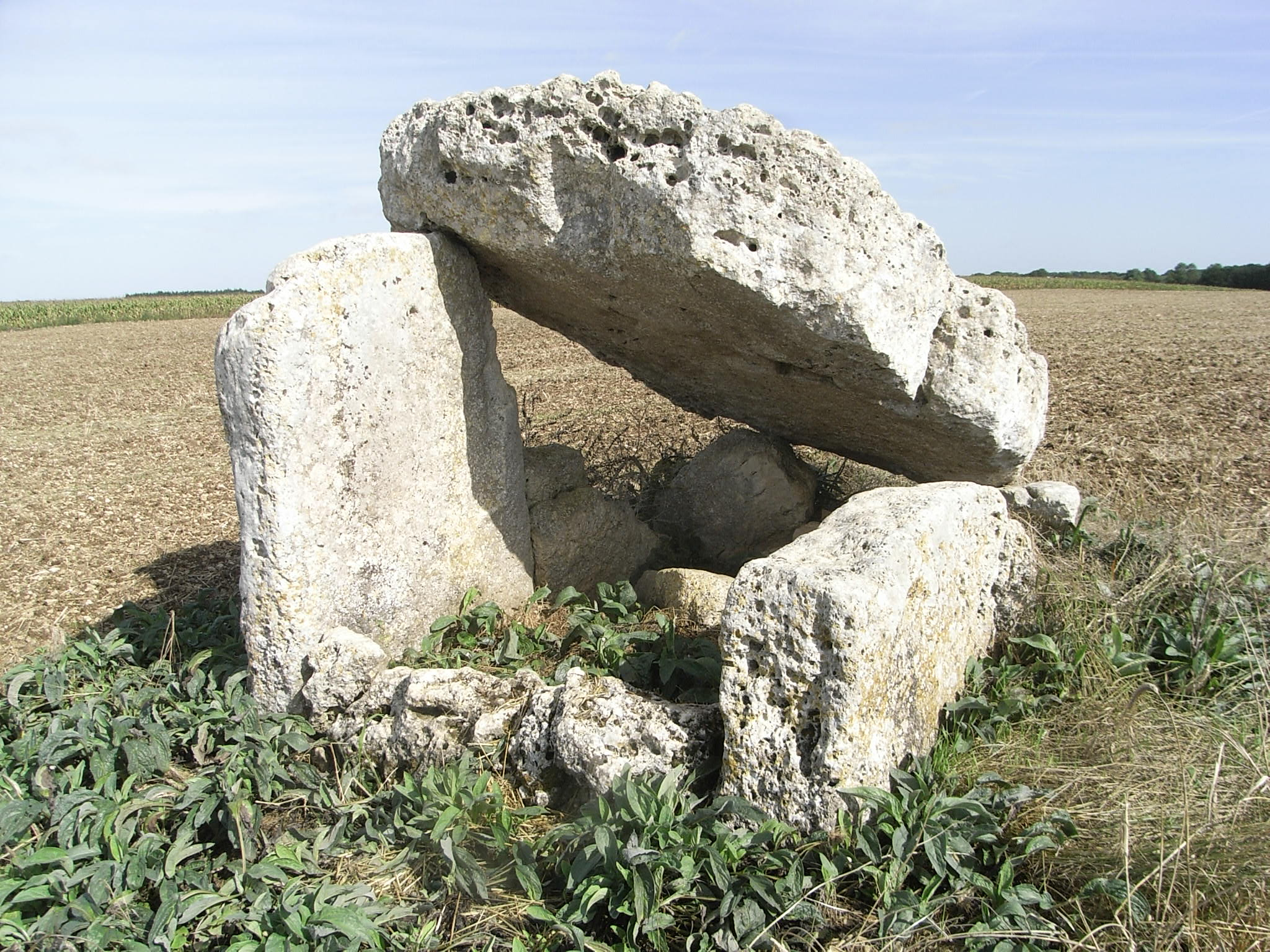 Dolmen de la Pierre Fouquerée à Ardillières (17) France, monument historique classement par liste de 1989 (vue sud). .